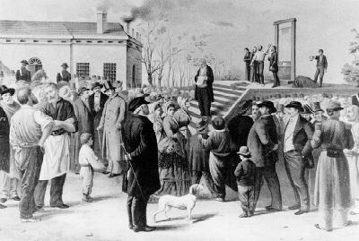 Esecuzione di Felice Orsini